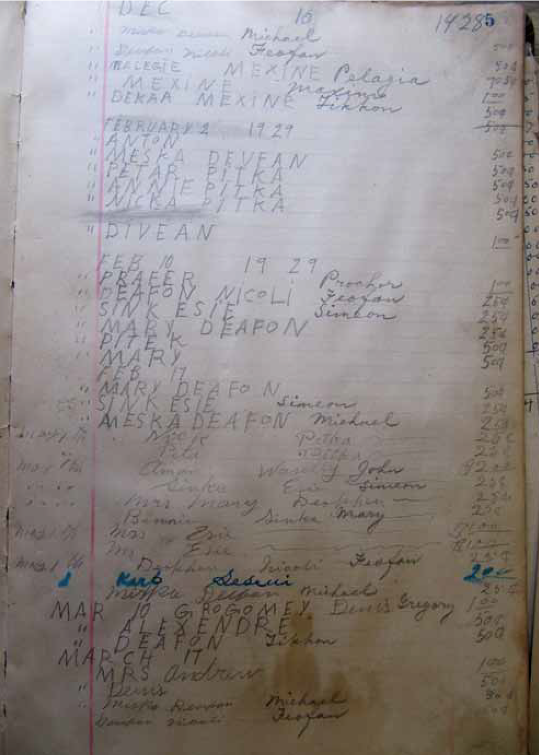 Записи атабасского церковного старосты с именами жертвователей православной церкви и величиной вносимых сумм. Можно заметить крестильные имена русского происхождения: Пелагия, Антон, Меска, Питка, Алеска.